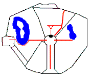 Plan schématique de Disneyland. En rouge les principaux axes de communications et en bleu les lacs.